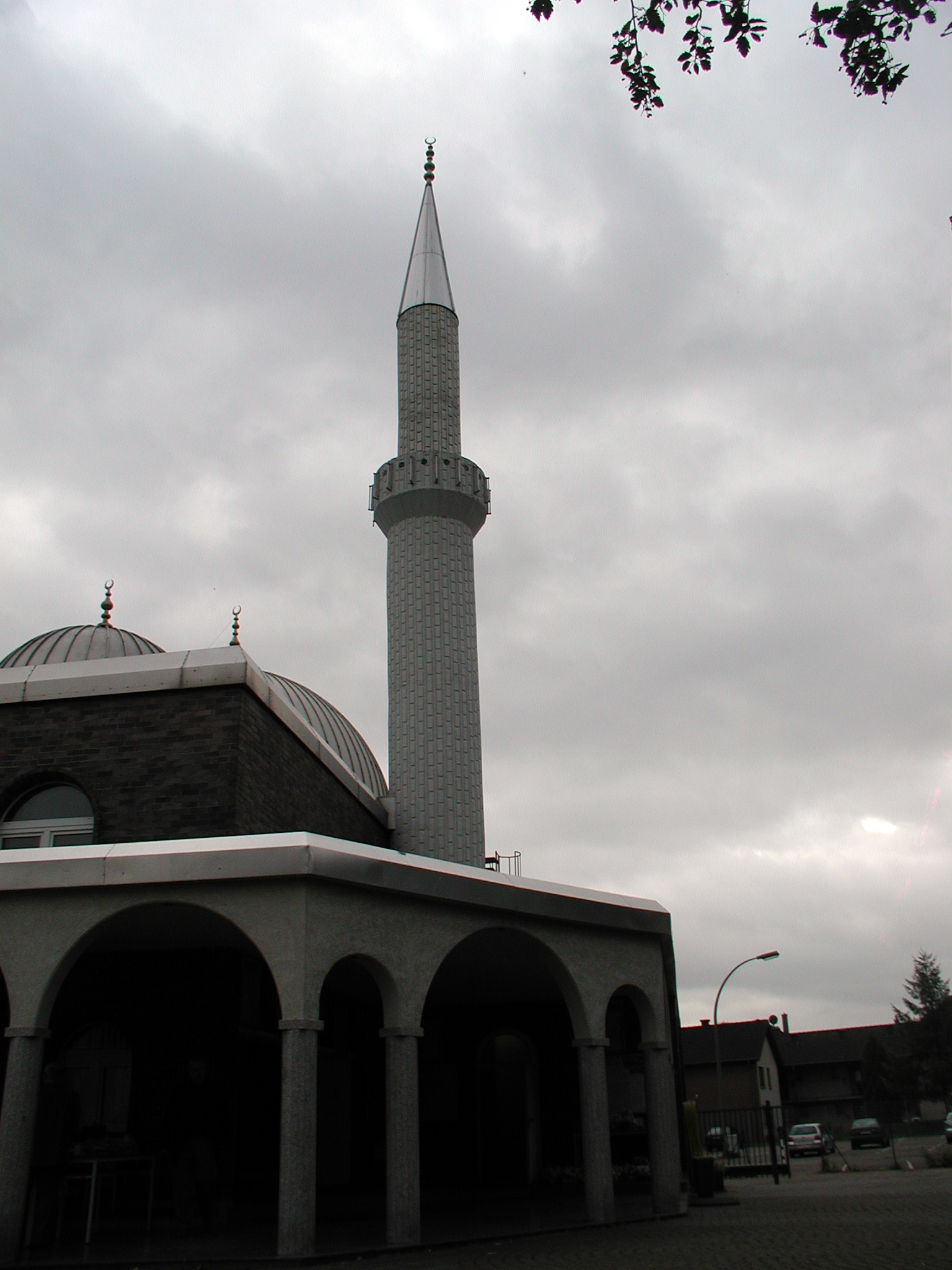 Moschee Wesseling, Mimar–Sinan-Camii